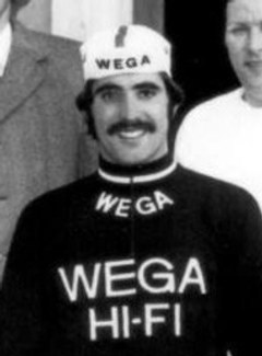 Ezio Cardi